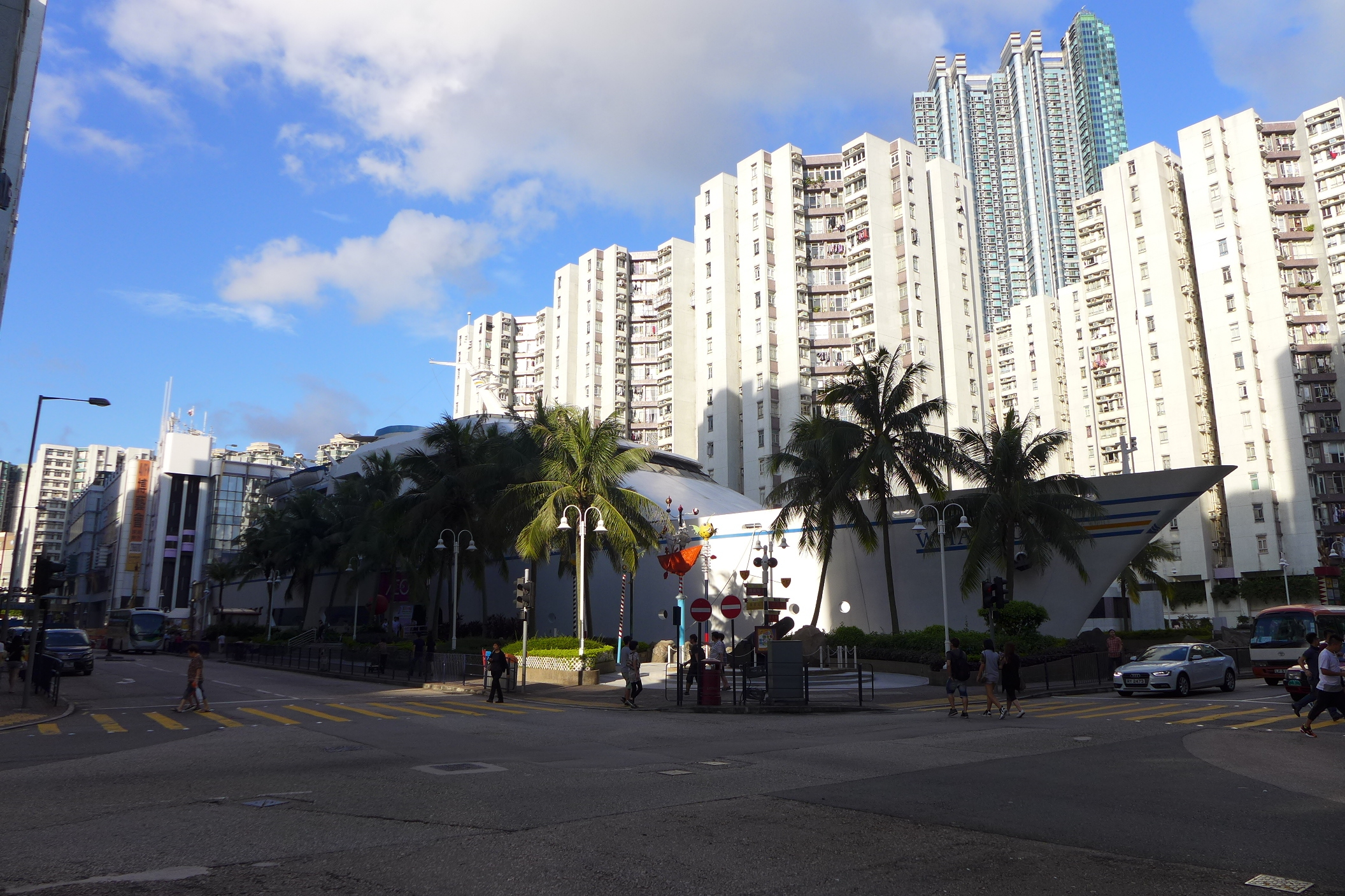 Whampoa Garden